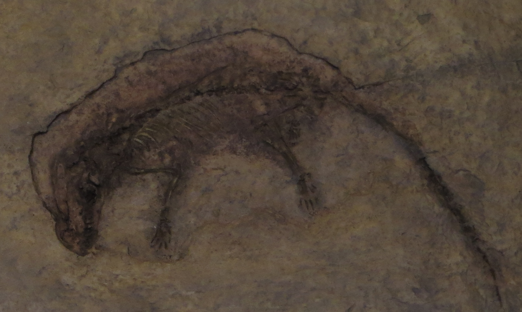 Fossil of Eomaia, an extinct mammal- Took the photo at Musee d'Histoire Naturelle, Paris